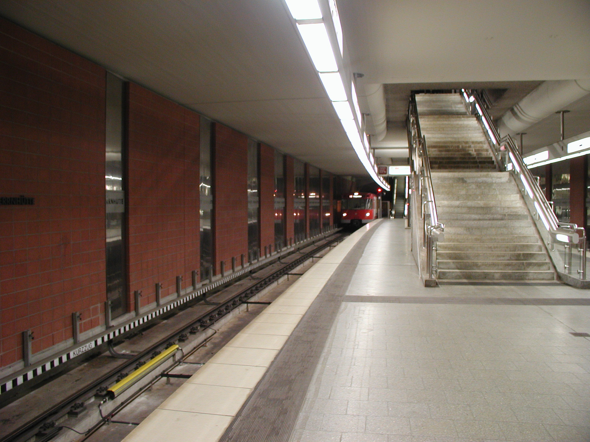 U-Bahnhof Nürnberg Herrnhütte